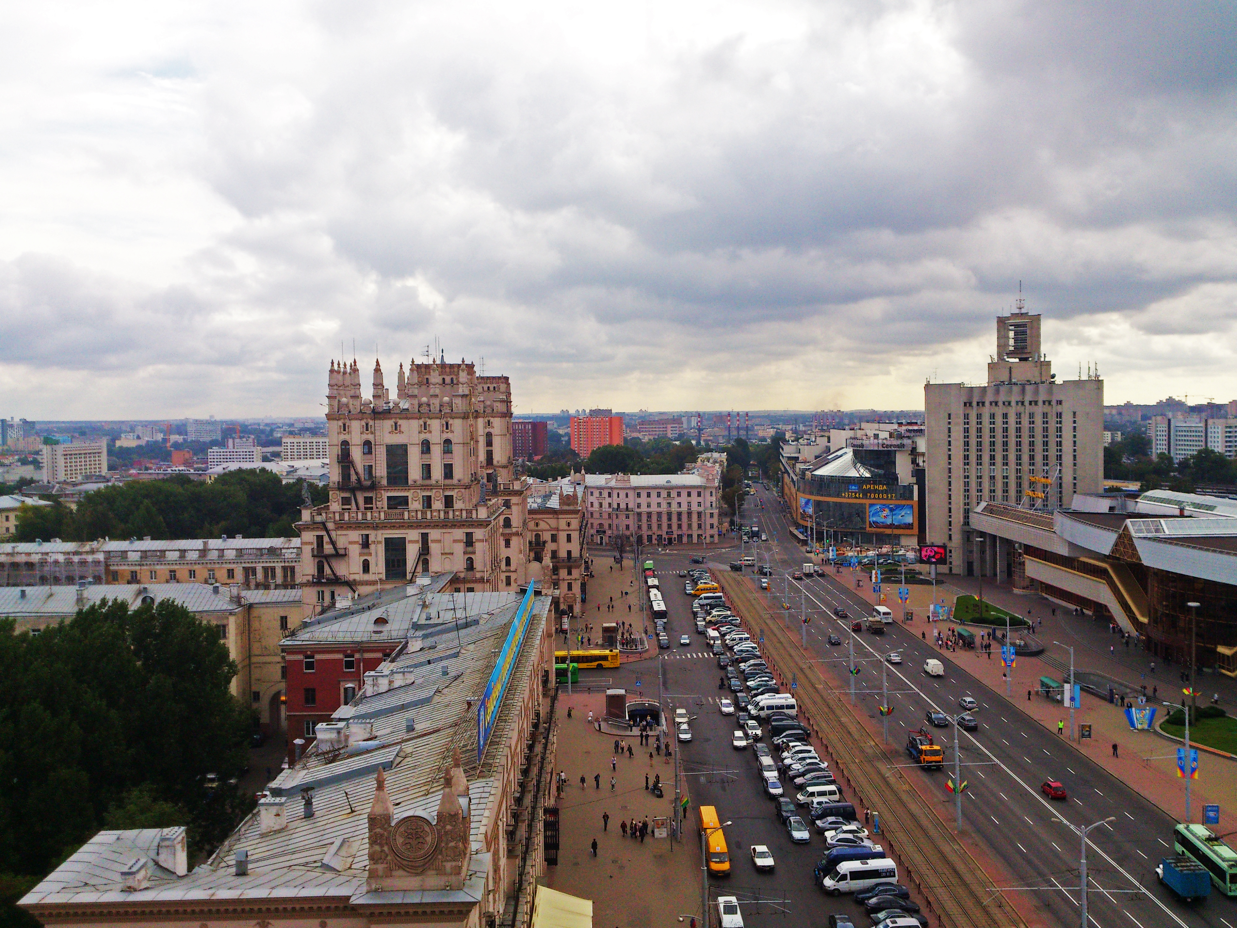 Привокзальная площадь (Минск)